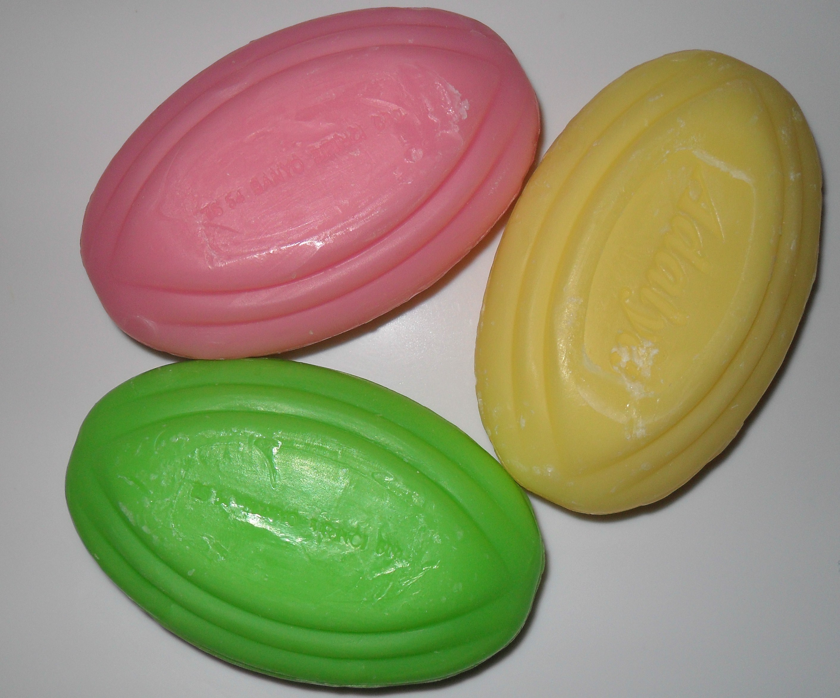 Her evin vazgeçilmez ihtiyacı olan el sabunları.